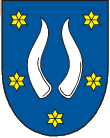 Znak obce Šišma